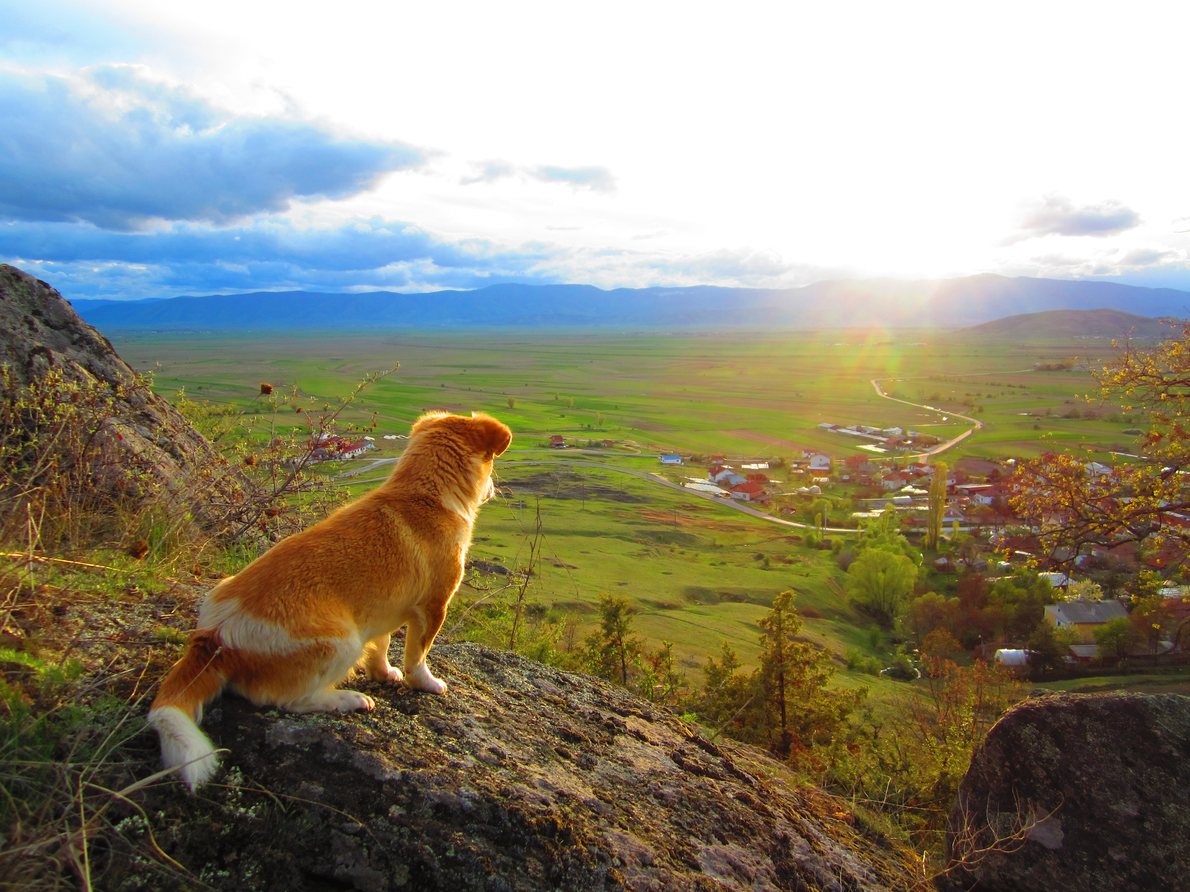 Куче кое гледа кон Прилепско Поле и с. Мажучиште од околниот рид.